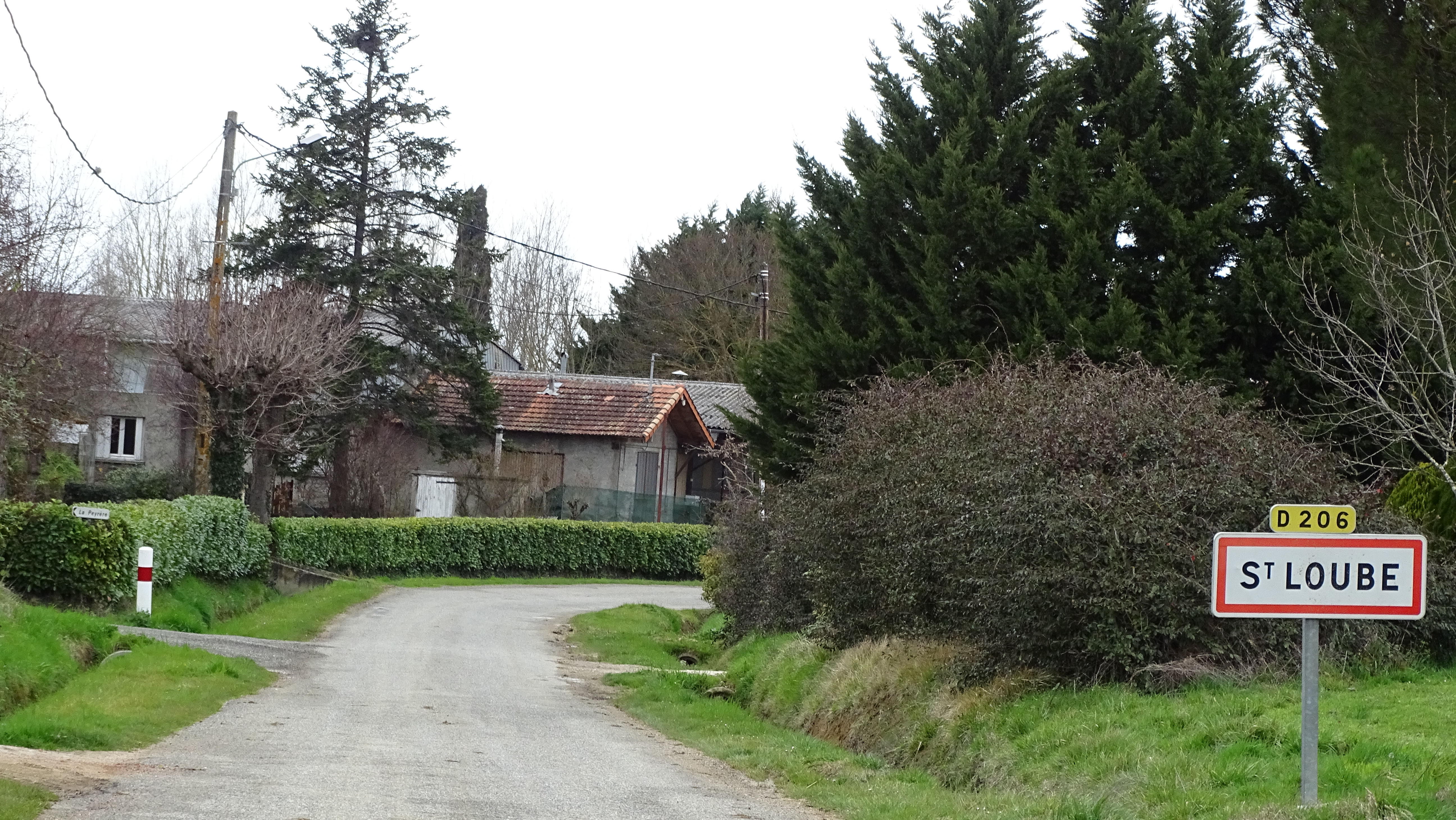 Saint-Loube